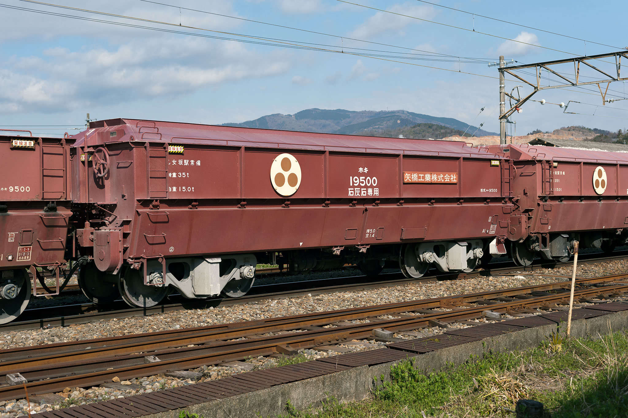 ホキ9500形19500 美濃赤坂駅にて撮影